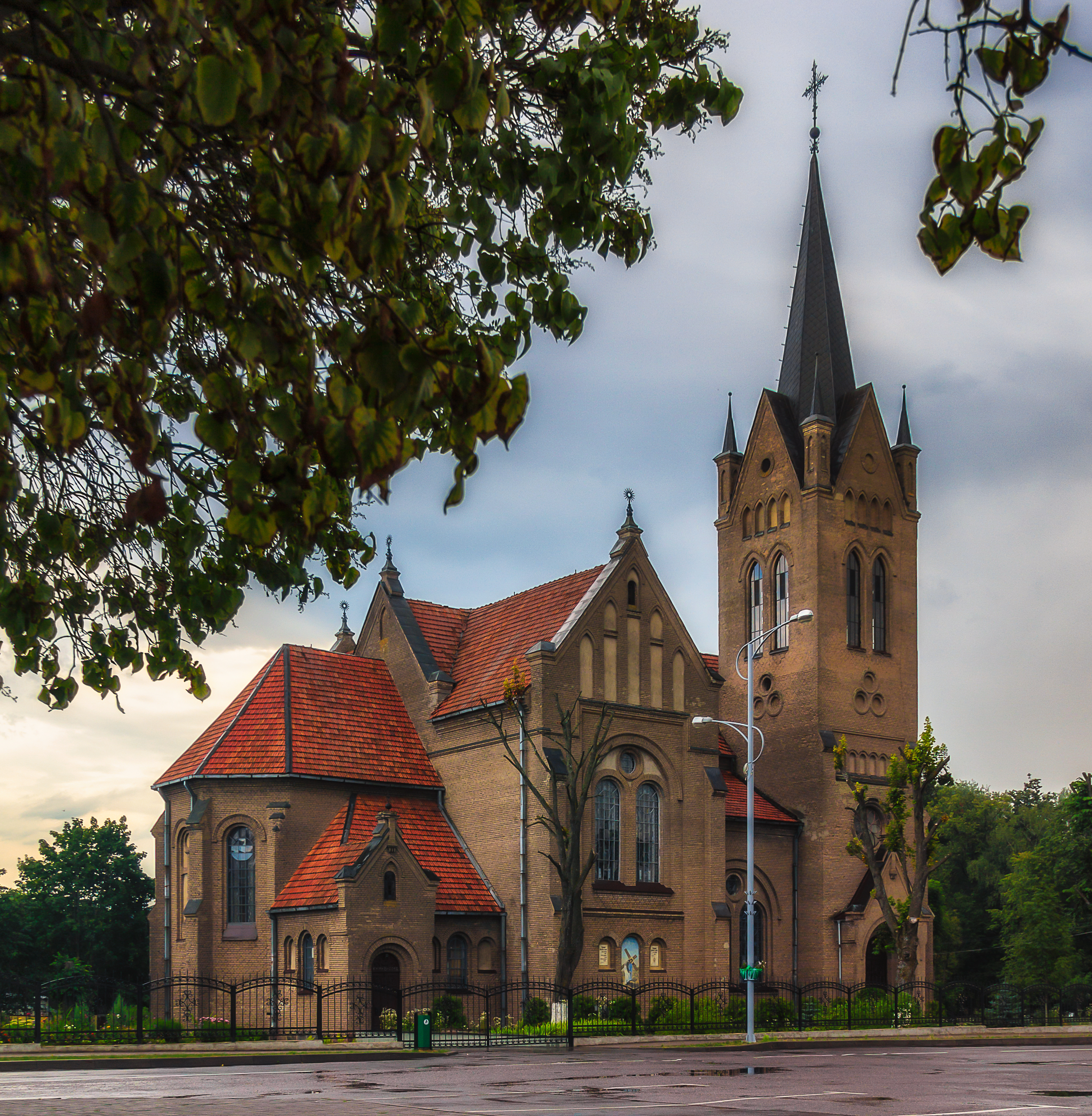 Беларуская (тарашкевіца): Касьцёл Узьвіжаньня Сьвятога Крыжа. г. Вялейка